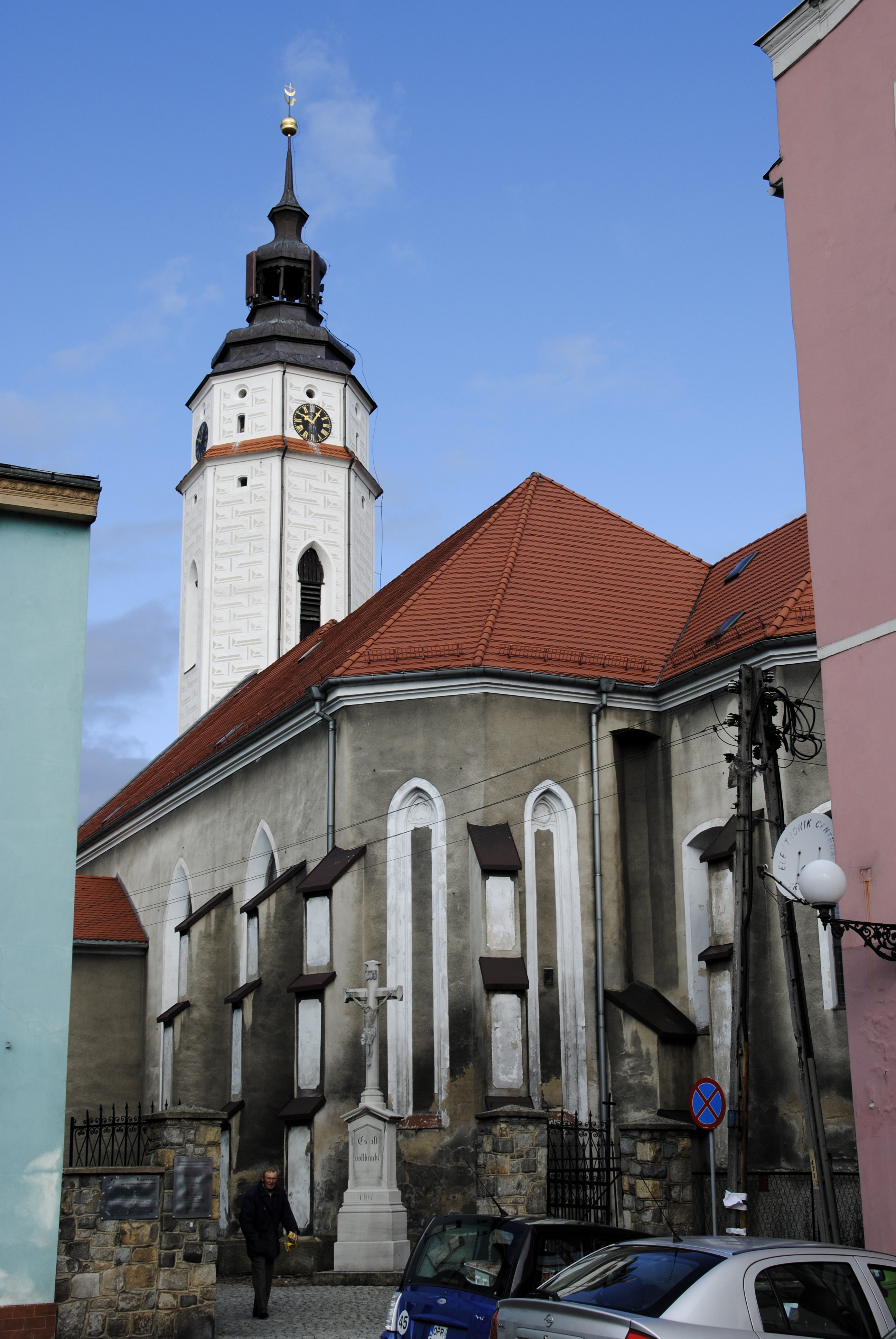 Mariä-Himmelfahrt-Kirche in Zülz (Oberschlesien)